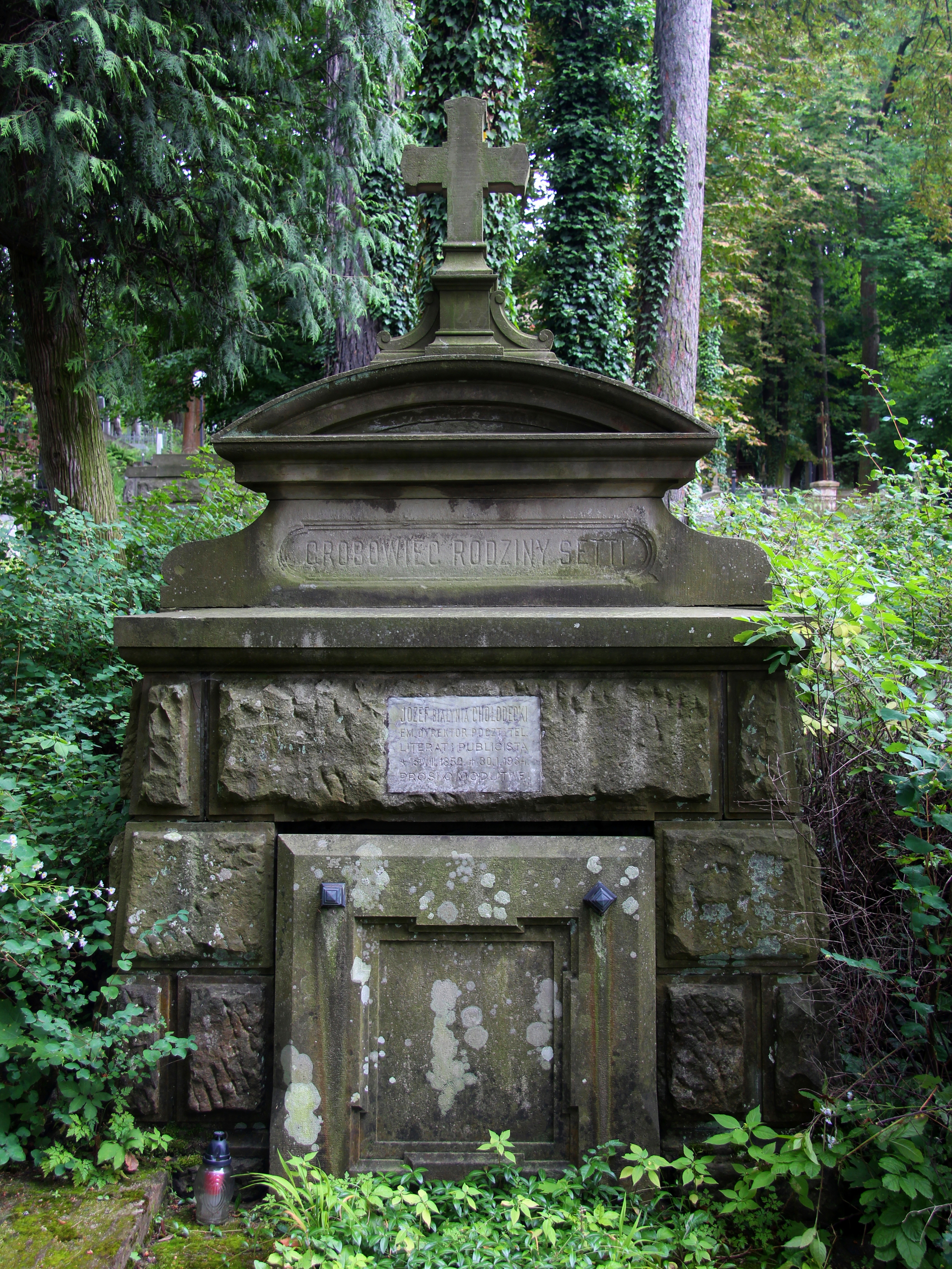 Гробівець родини Сетті.Личаківський цвинтар , поле 60.